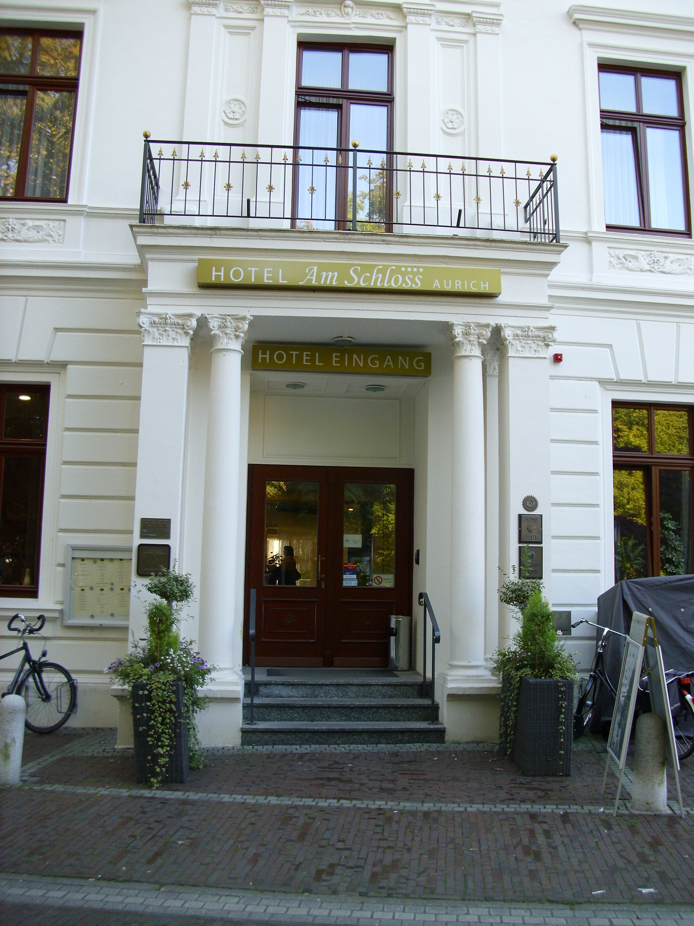 Eingangsportal, Hotel am Schloss (früher Piqueurhof) in Aurich, Ostfriesland, im September 2015